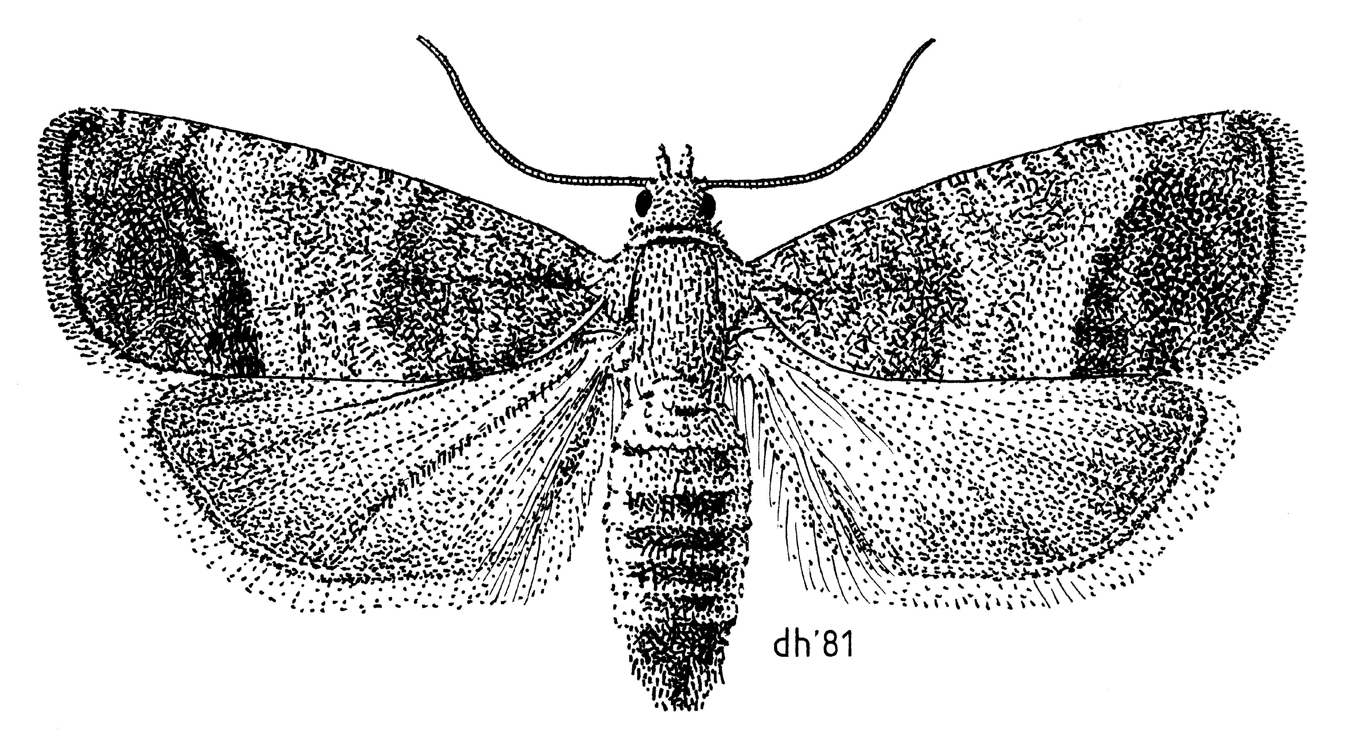 (Lepidoptera: Tortricidae) Cydia pomonella illustrated by Des Helmore.